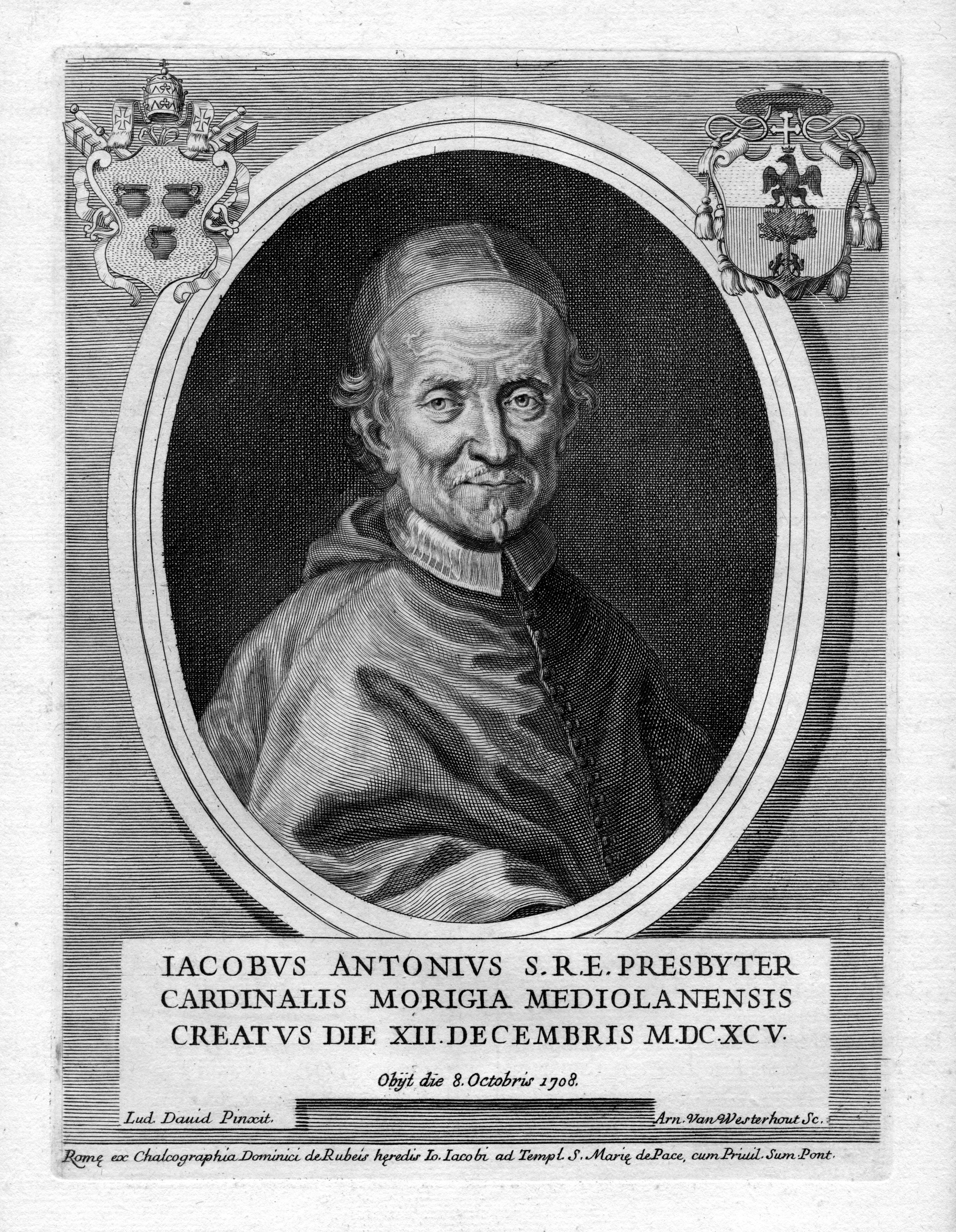 portrait gravé